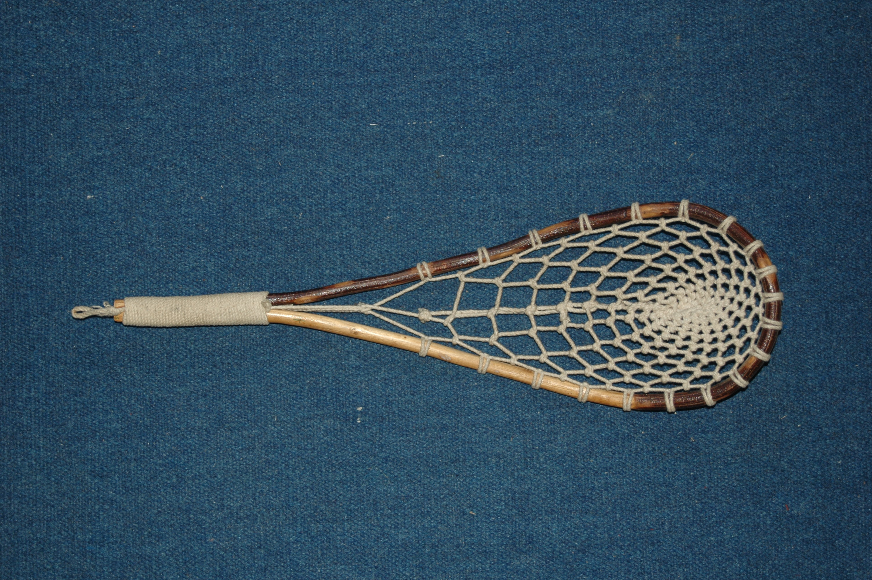 Pelote basque - Xare. Photo prise le 08/08/06 par Harrieta171